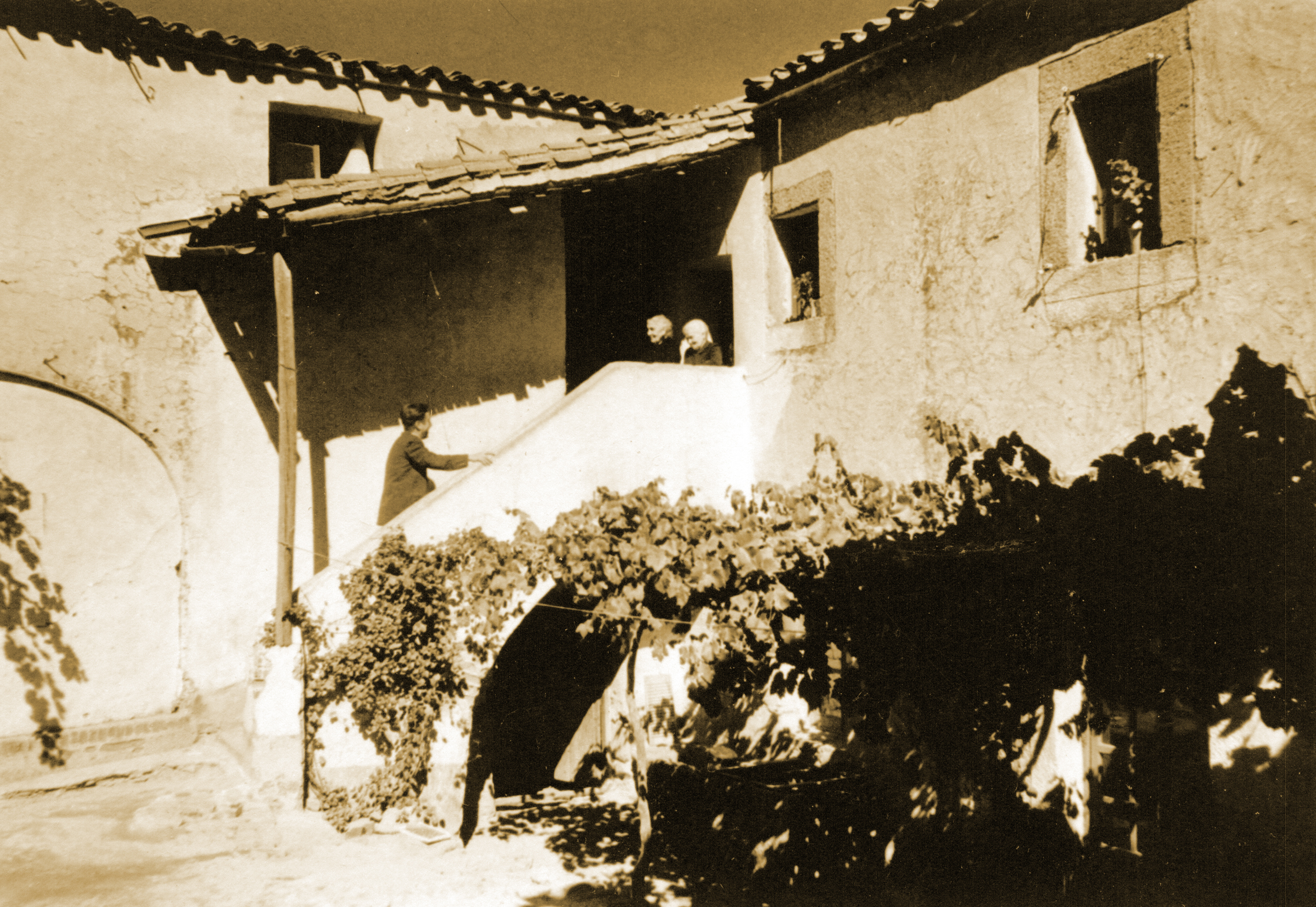 Interior de la iglesia evangélica de Ibahernando (Cáceres).